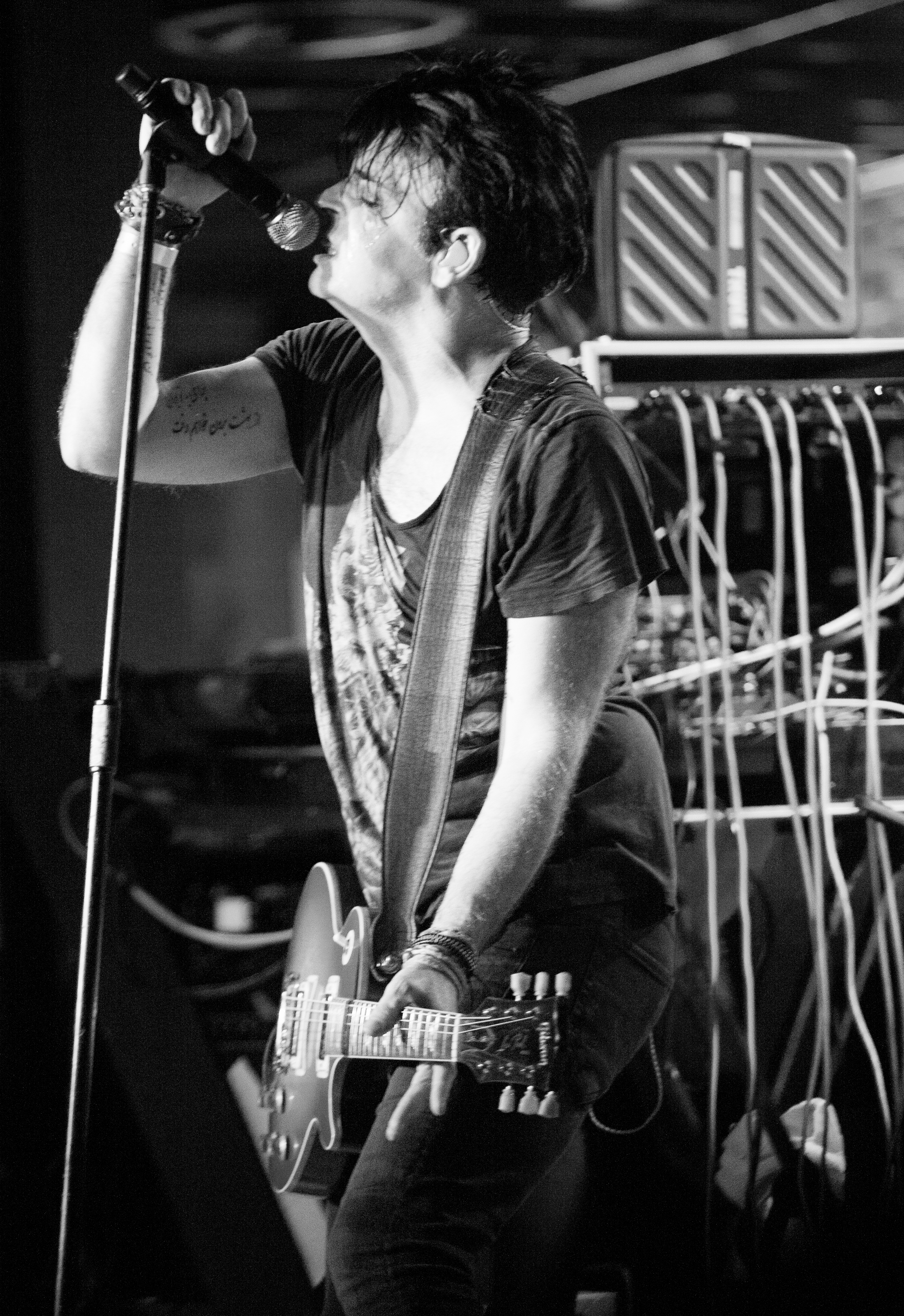 Gary Numan at SXSW 2014--58.jpg